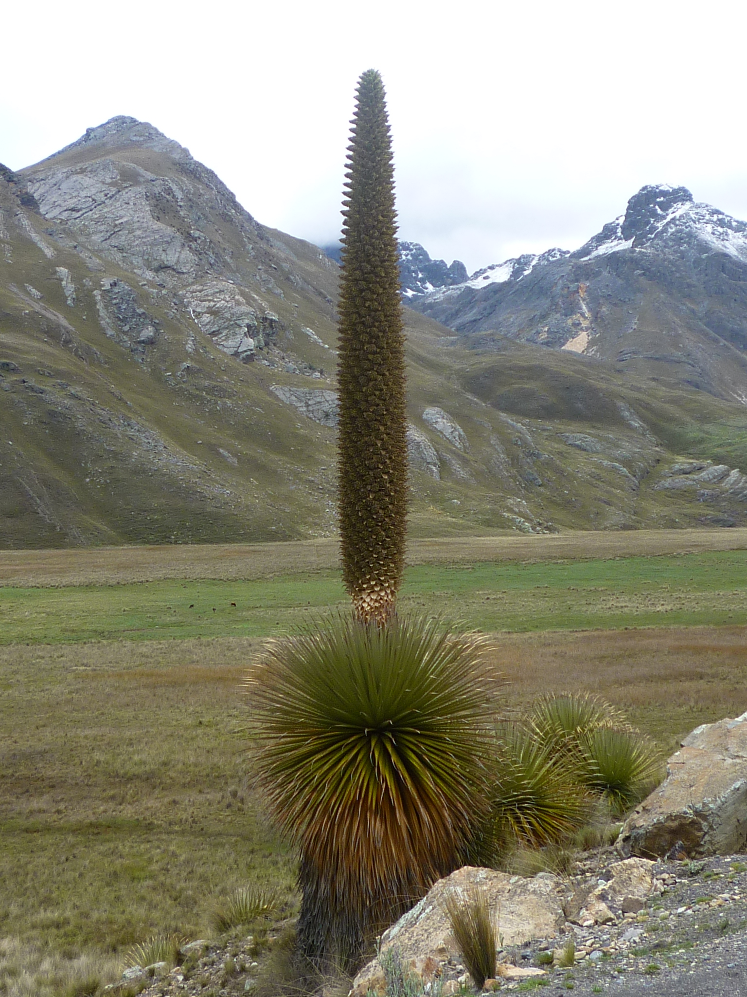 Puya raimondii Photo prise dans la Province de Huaraz, Peru.